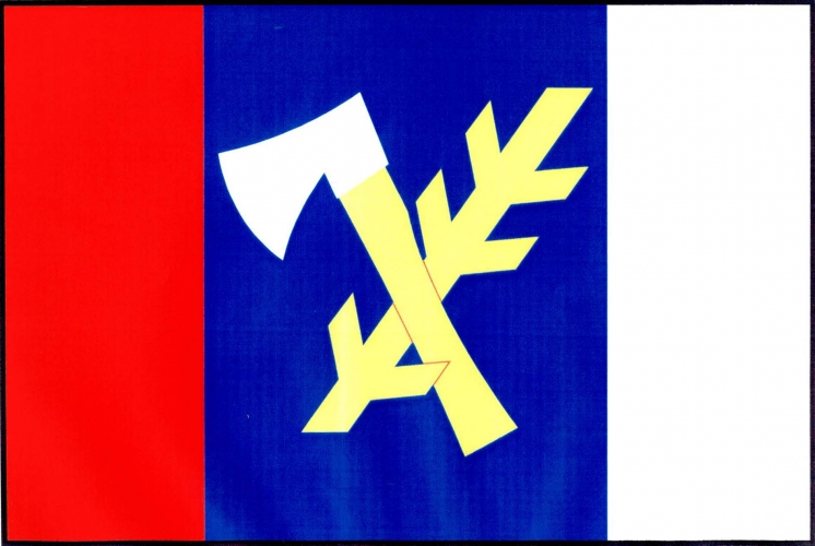 vlajka, Starý Petřín, okres Znojmo